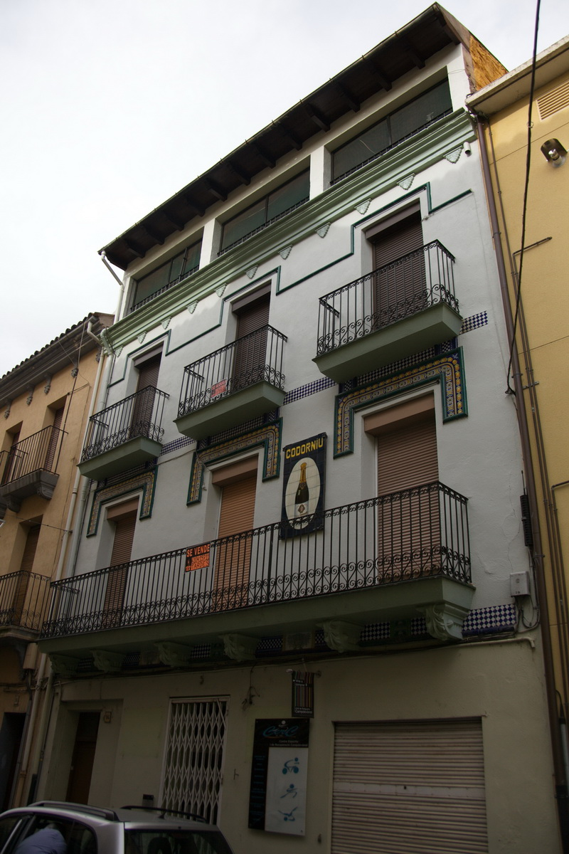 Casa al carrer Major, 16 (Campdevànol)